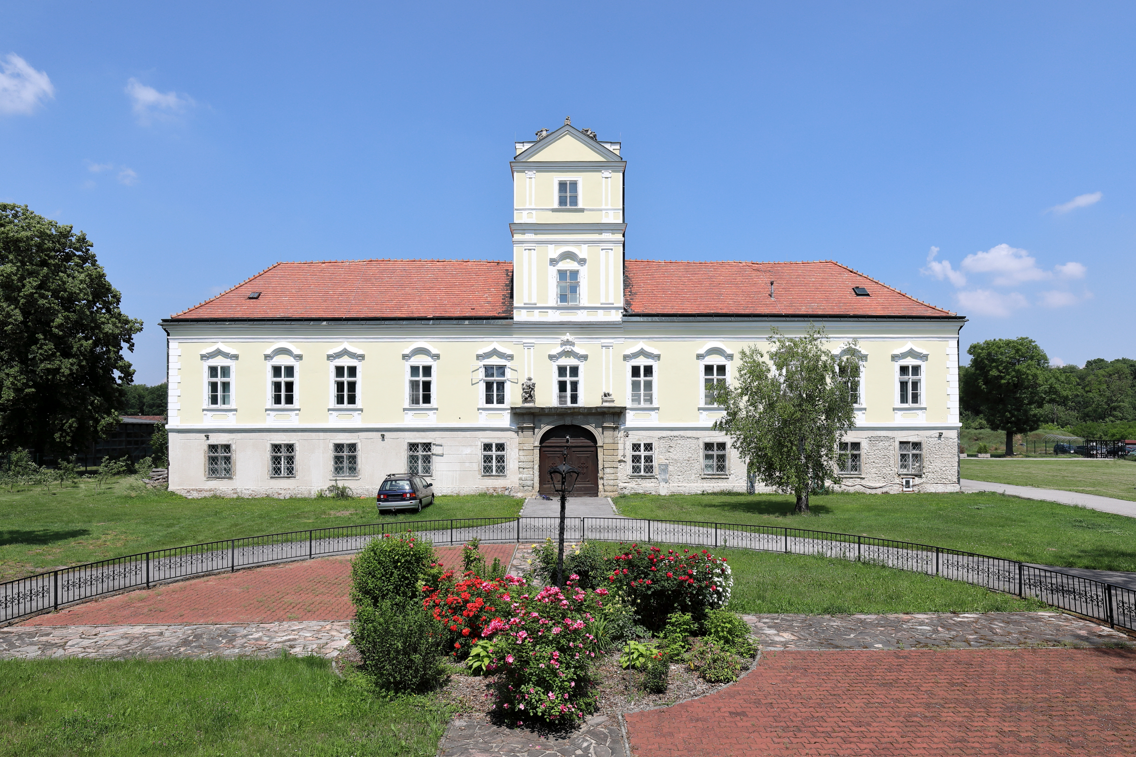 Süd des Schloss Obersiebenbrunn in der niederösterreichischen Marktgemeinde Obersiebenbrunn.Ein Freiherr von Herberstein ließ in der 1. Hälfte es 16. Jahrhunderts den Vorgängerbau, ein Freihof, zu einem frühbarocken Schloss umbauen. Im 18. Jahrhundert wurde die Anlage umgebaut und erweitert. Seit 2001 ist das Schloss im Besitz der koptisch-orthodoxen Kirche, die darin das St. Antonius-Kloster einrichtete.